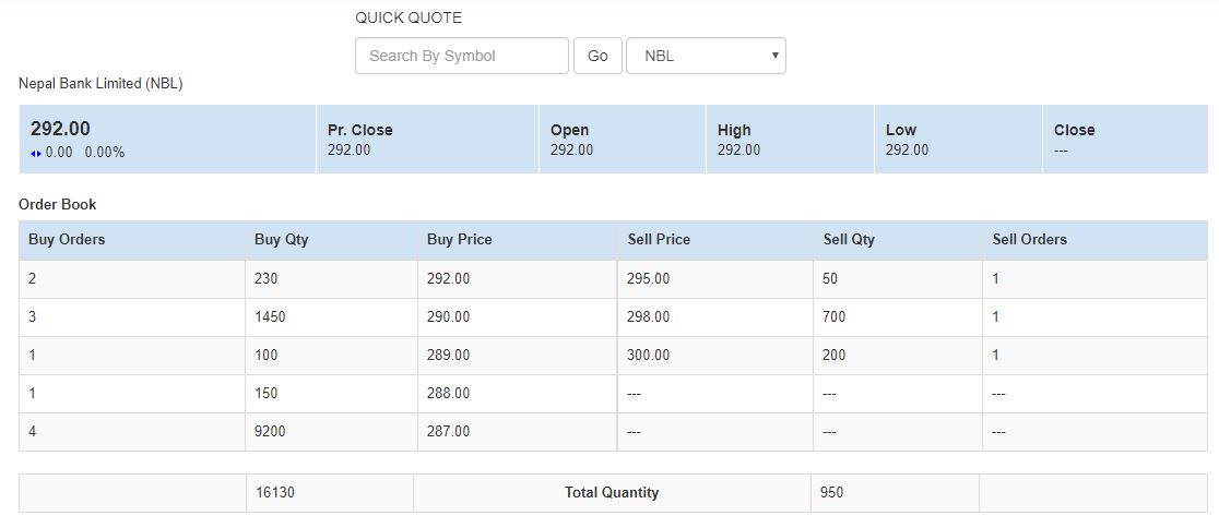 नेपाली: मिति २०७५ चैत्र ३ को नेपाल बैंक लिमिटेडको मार्केट डेप्थ